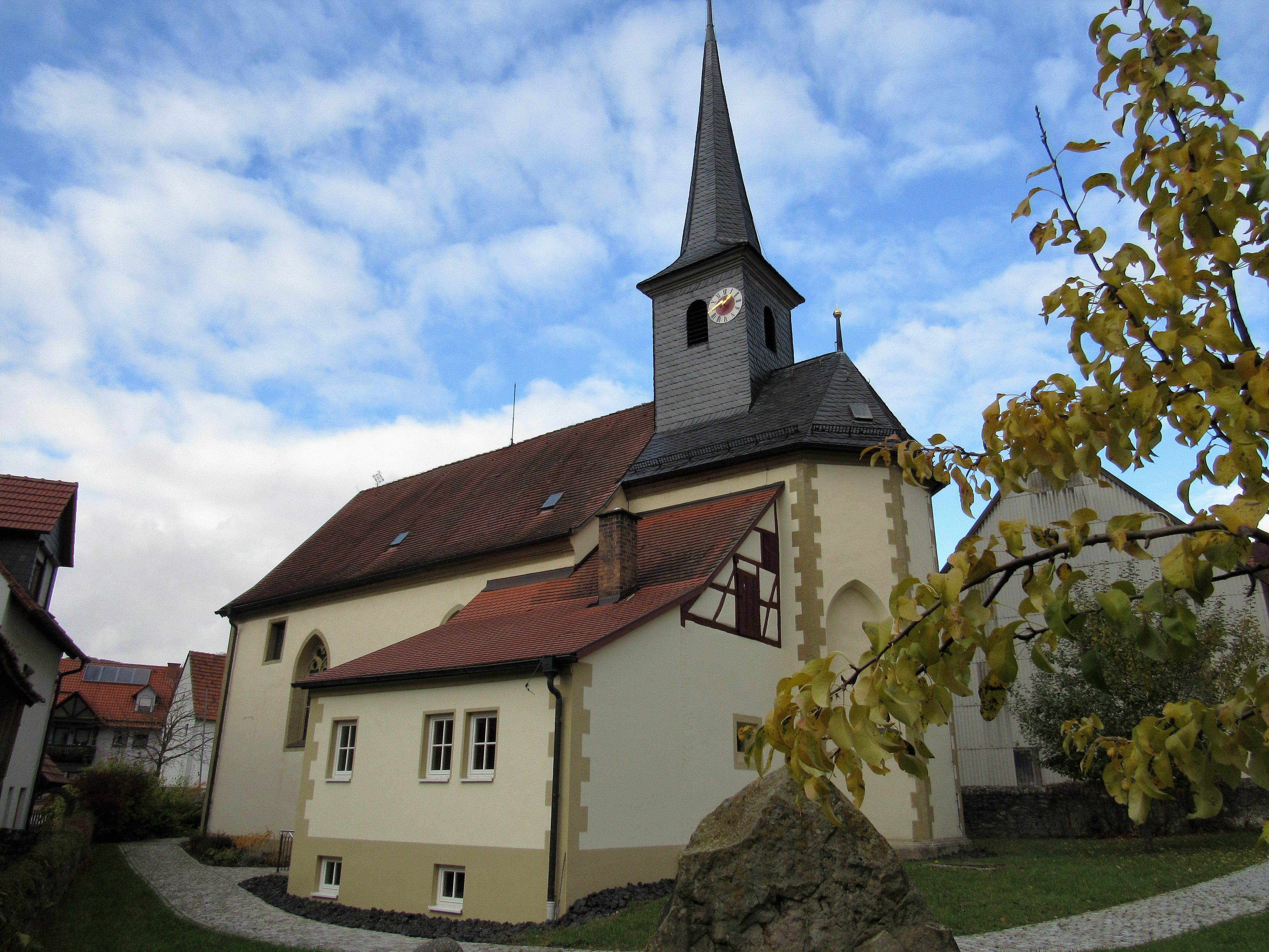 Kirche von Ginolfs, soweit weg wie nur möglich, max. mögl. Ausschnitt